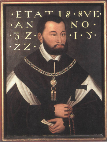 Albrecht von Brandenburg-Ansbach (1490-1568), last Grand Master of Teutonic order in Prussia (1511-1525)